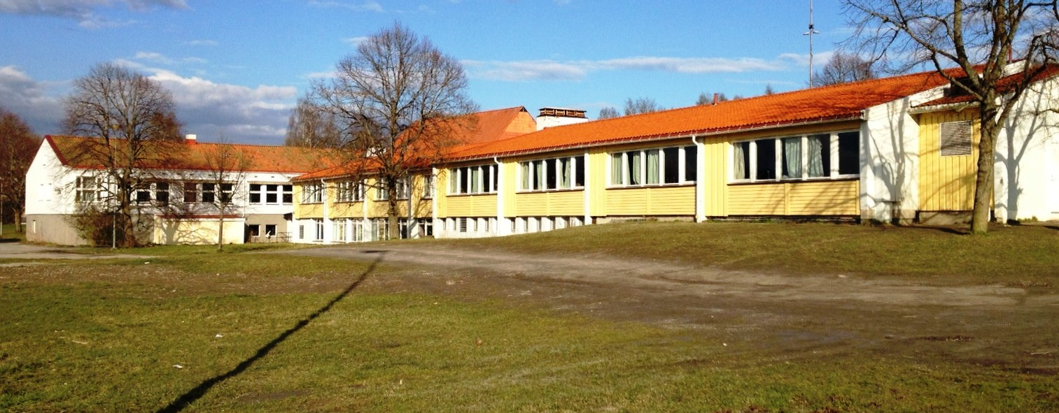 Ekeberg skole, Oslo